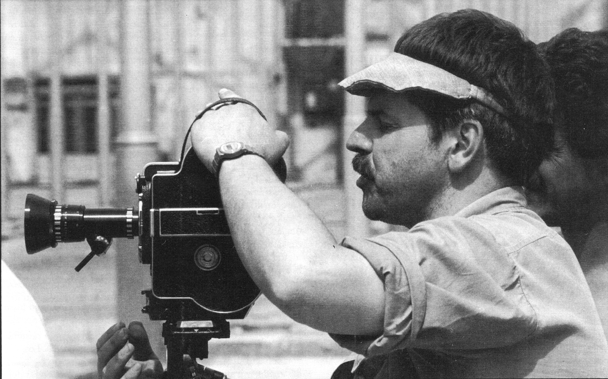 Jorge Acha durante el rodaje de Standard